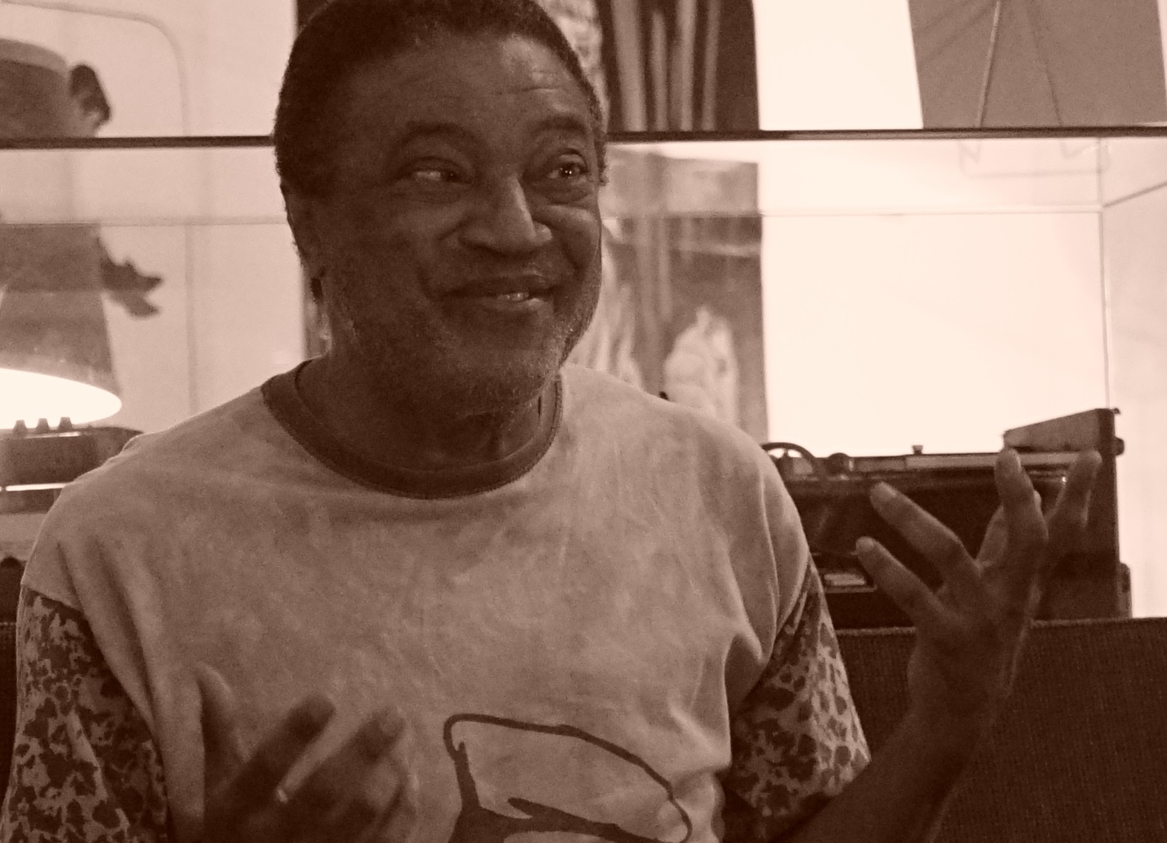 Conférence à Reims, médiathèque Croix-Rouge.